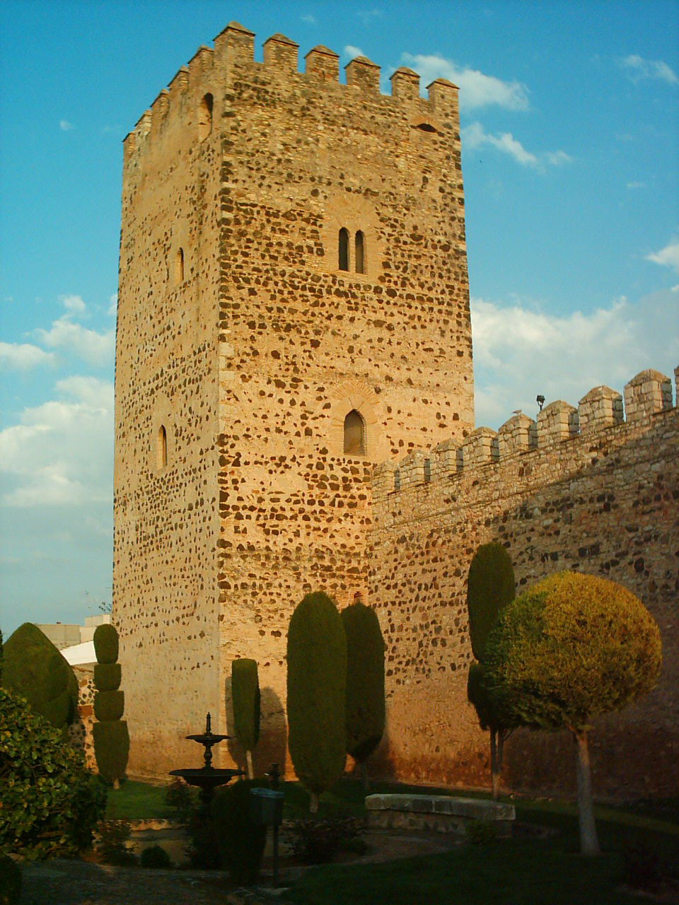 Torre del homenaje del castillo de Bolaños(Ciudad Real)España